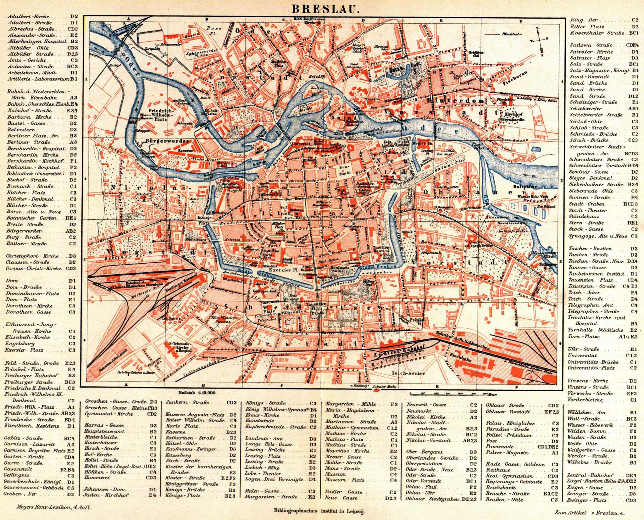 Breslau (1 : 19.000)